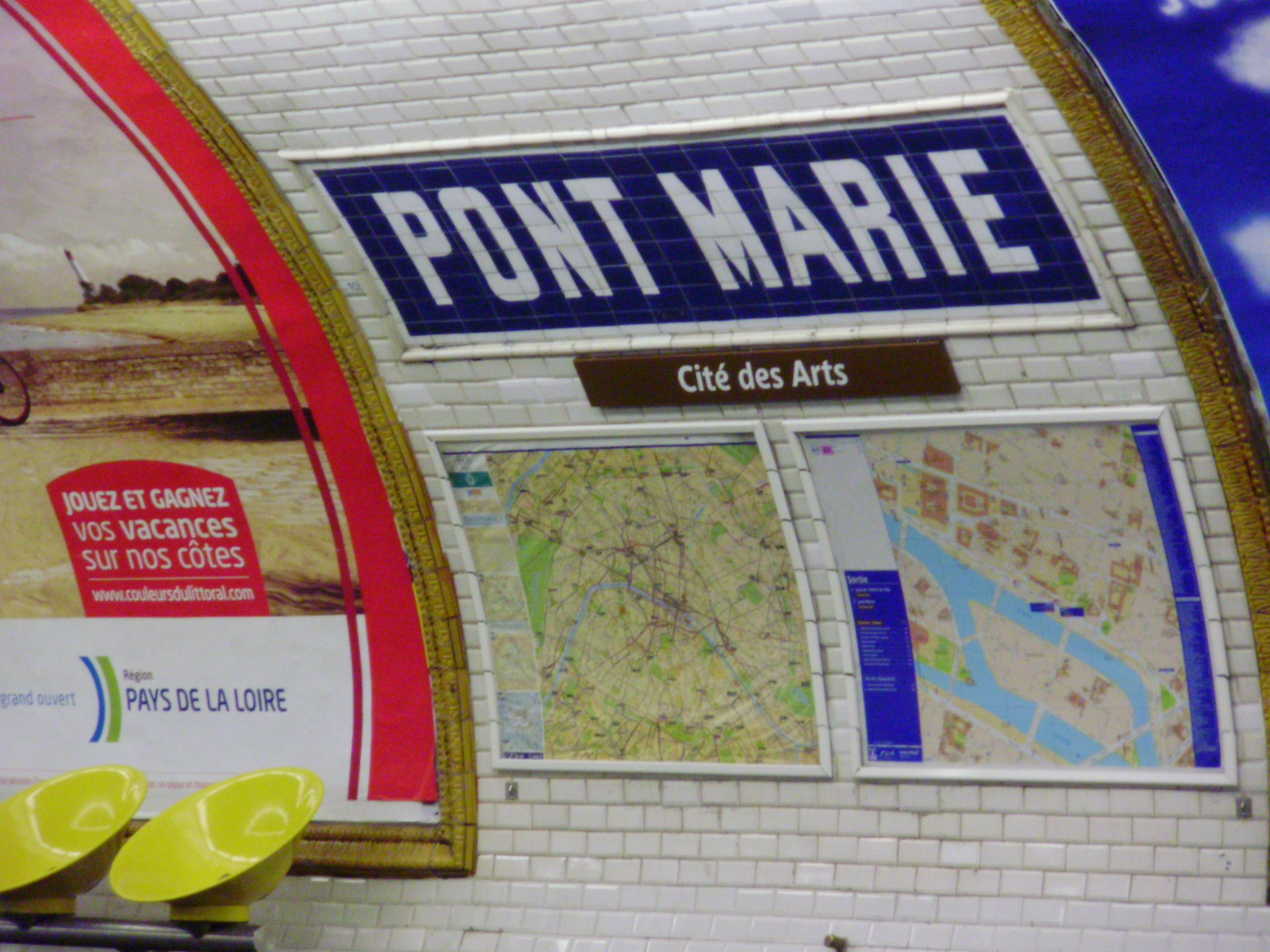 Nom de la station « Pont Marie » du métro de Paris, avec le sous-titre « Cité des Arts »